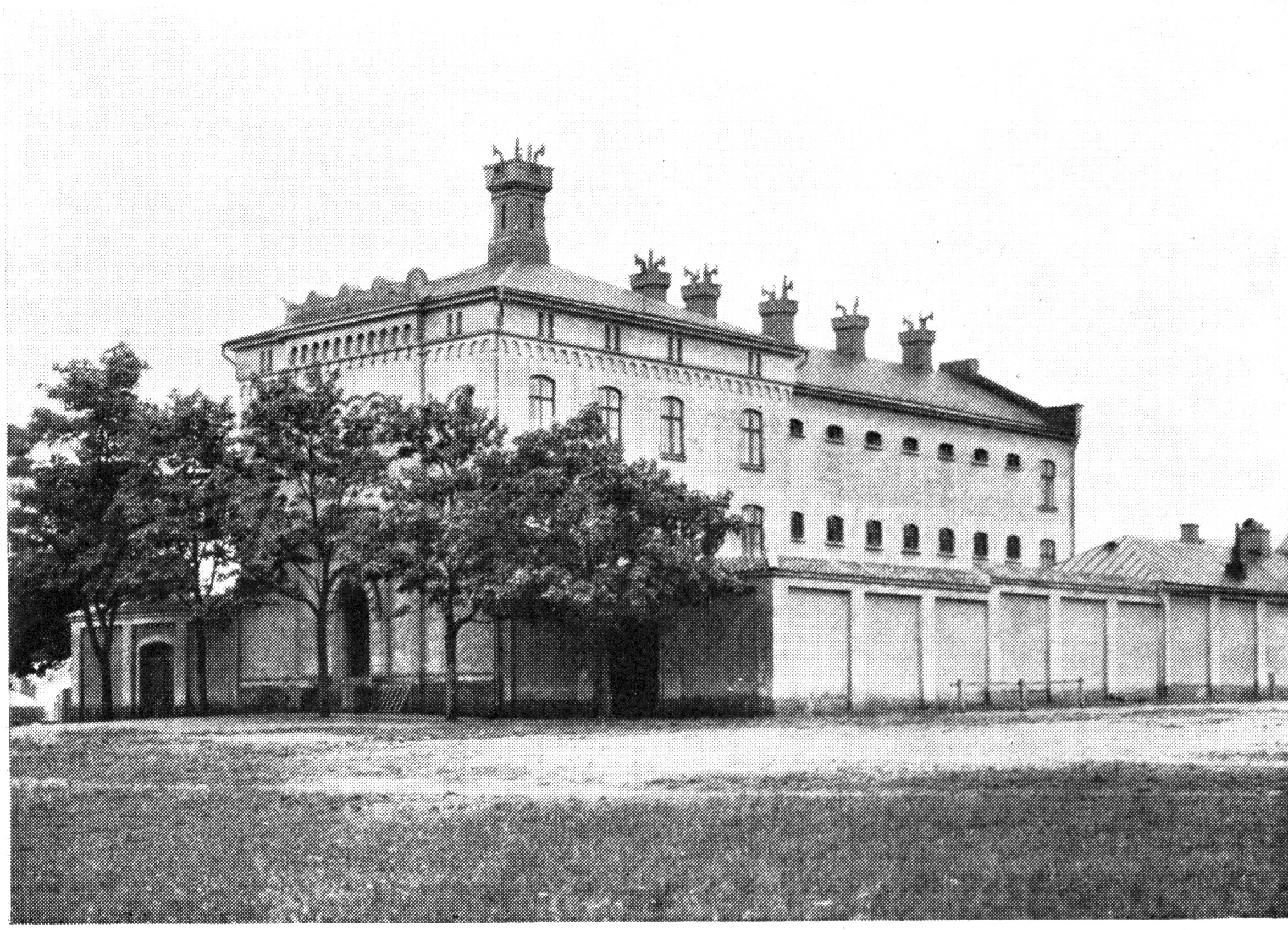 Kronohäktet i Västervik